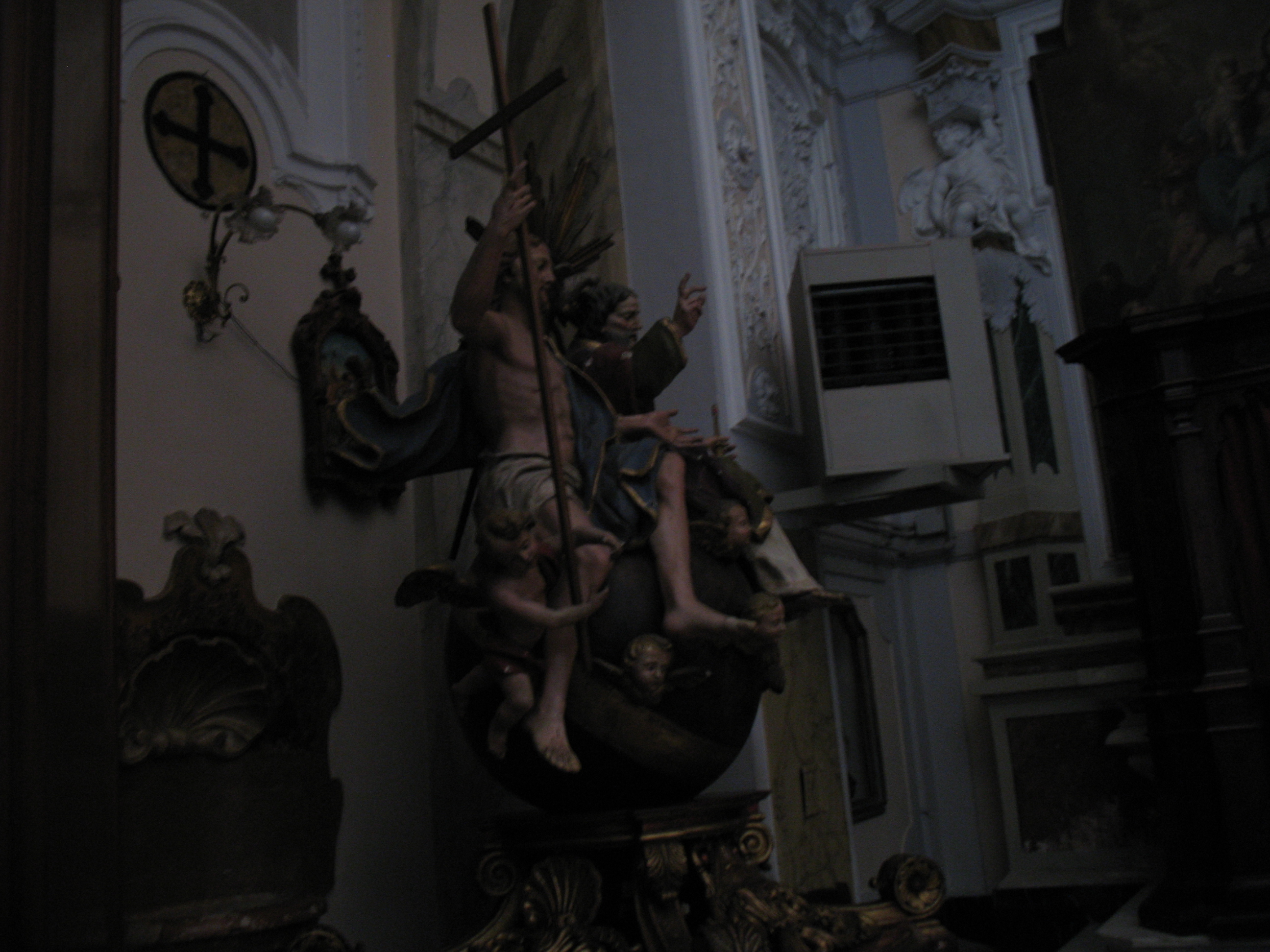 Statua custodita nella Chiesa di San Domenico (Chieti)